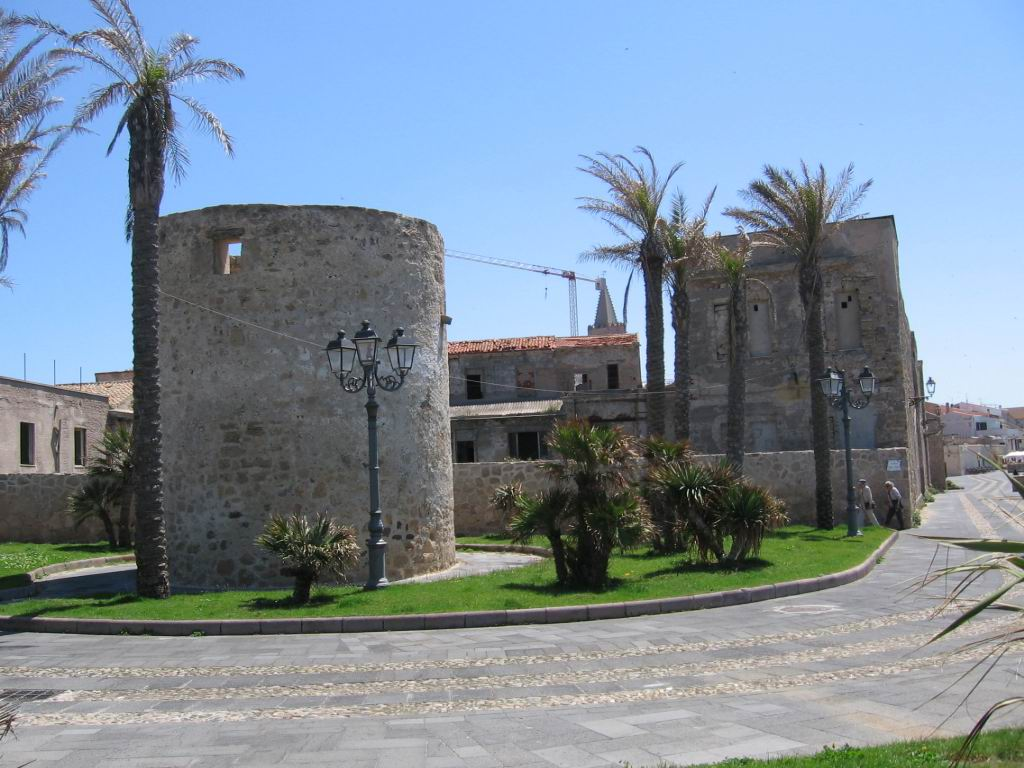 Alghero. Foto: Mihai Sorin Sirbu